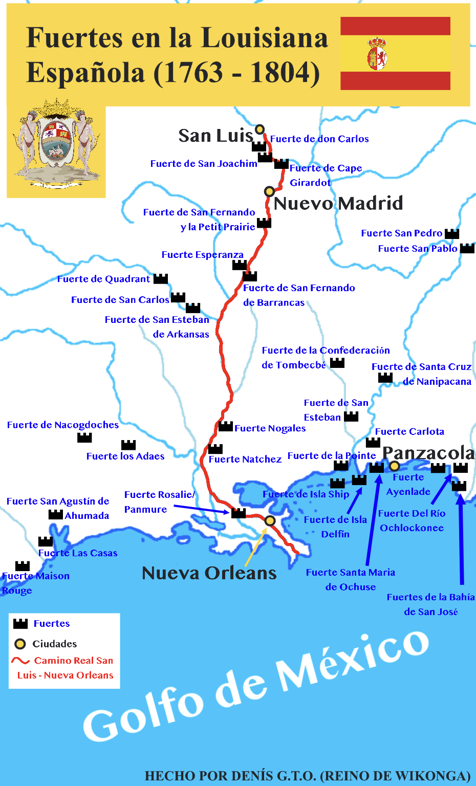 Mapa con fuertes españoles en el Territorio de la Louisiana Española (Imperio Español). Además contiene el Camino Real desde Nueva Orleans hasta San Luis.